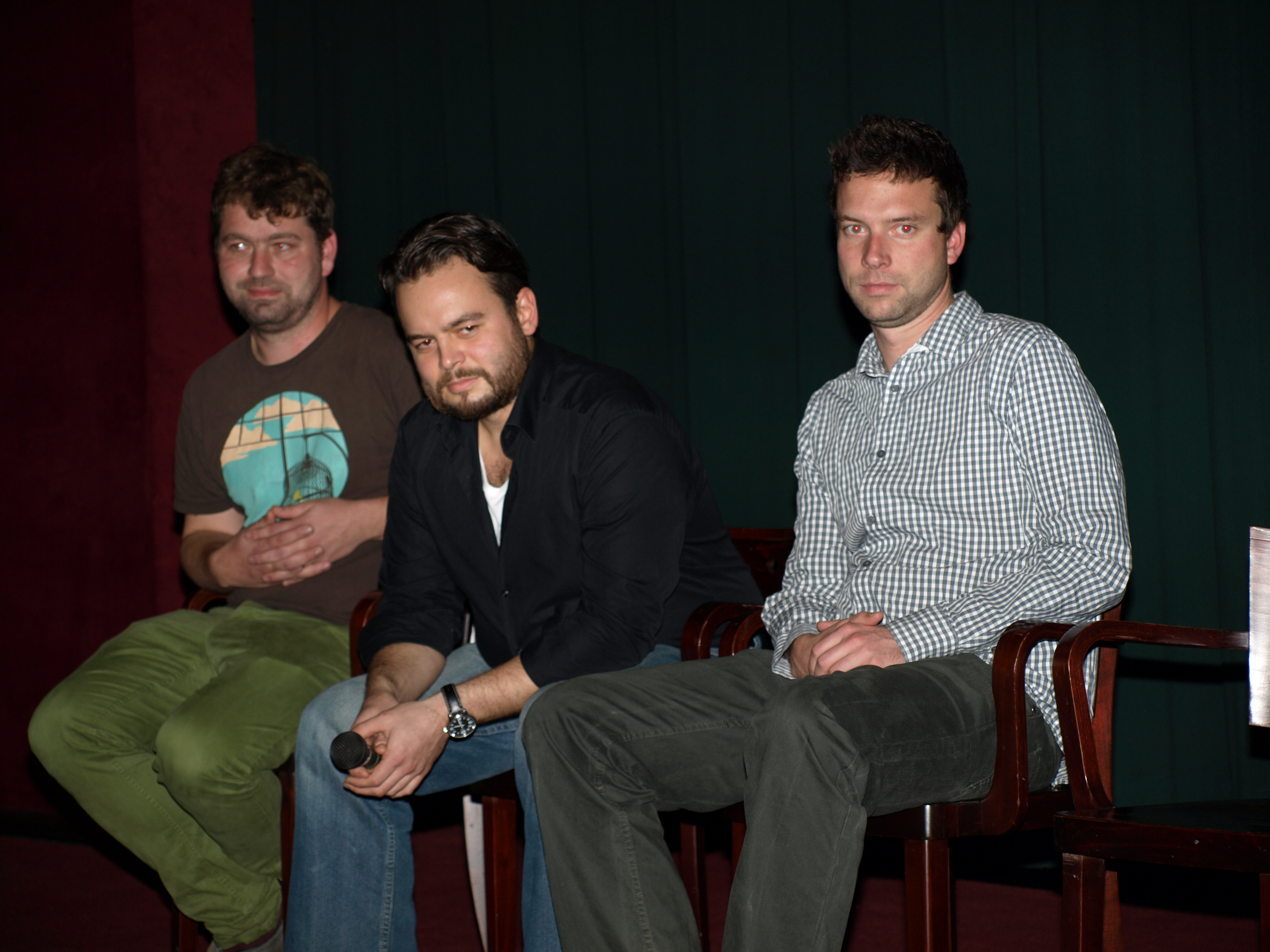 Novinářská konference - 10Mpix.cz &